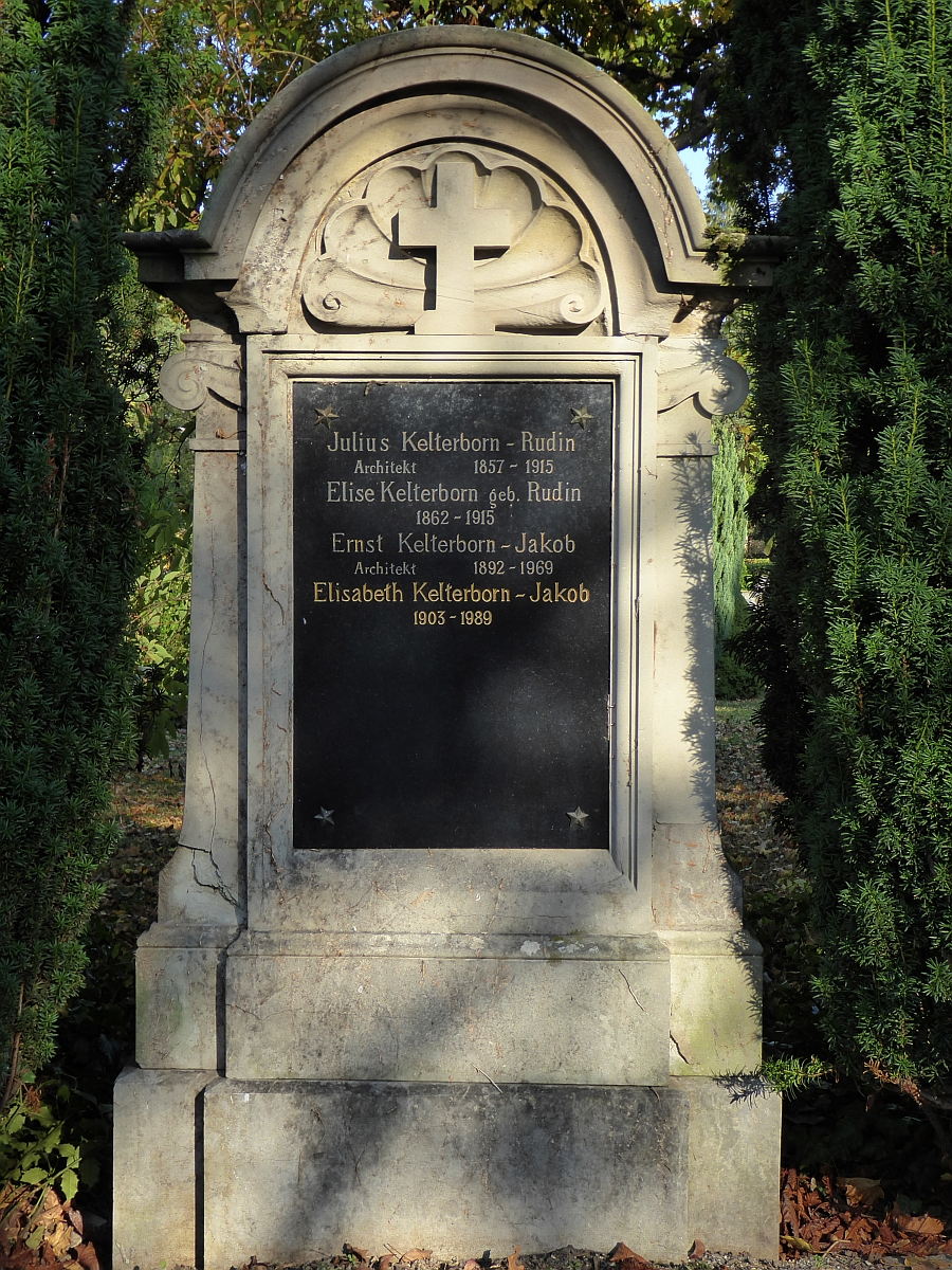 Julius Kelterborn-Rudin (1857–1915) Architekt, Grab auf dem Friedhof Wolfgottesacker, Basel